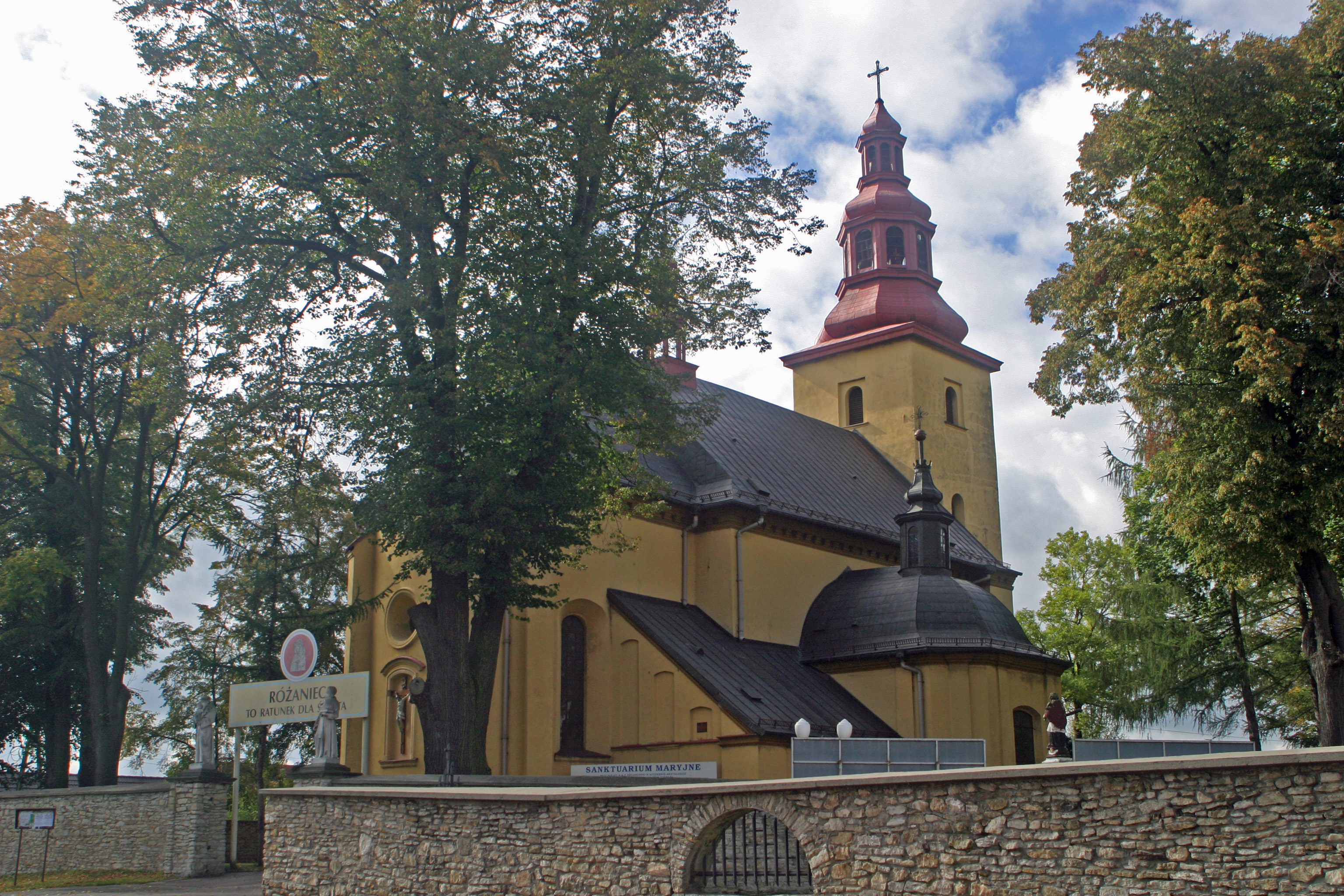 Myszków Mrzygłód - kościół parafialny pw. Wniebowzięcia NMP, 1653-1662, XVIII